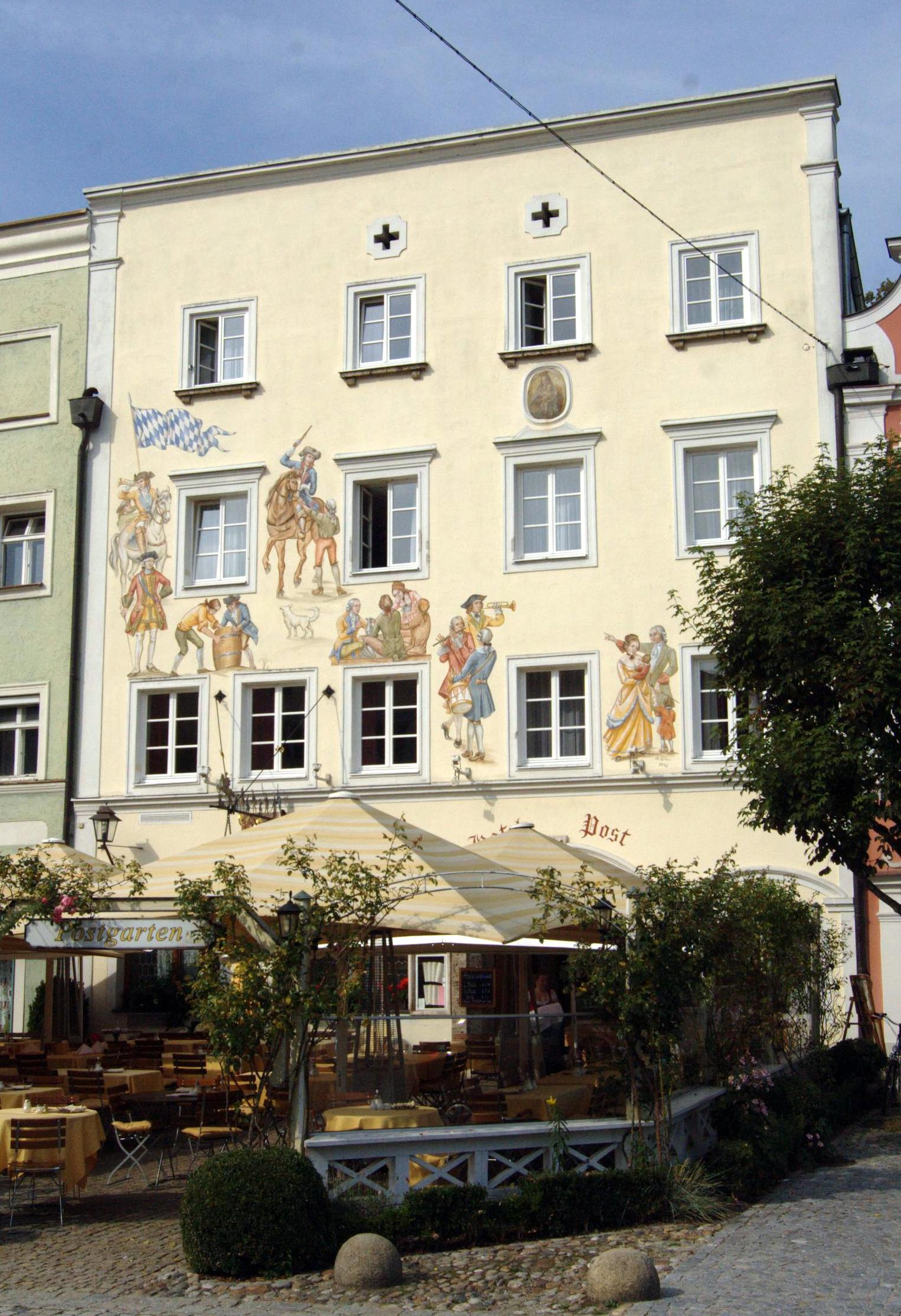 Gasthof zur PostThis is a photograph of an architectural monument.